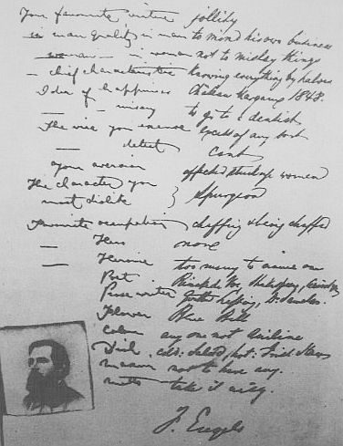 Friedrich Engels Eintrag in das Poesiealbum von Jenny Caroline Marx, Tochter von Karl Marx, Fotografiert am 16. August 2003 im Karl-Marx-Haus in Trier